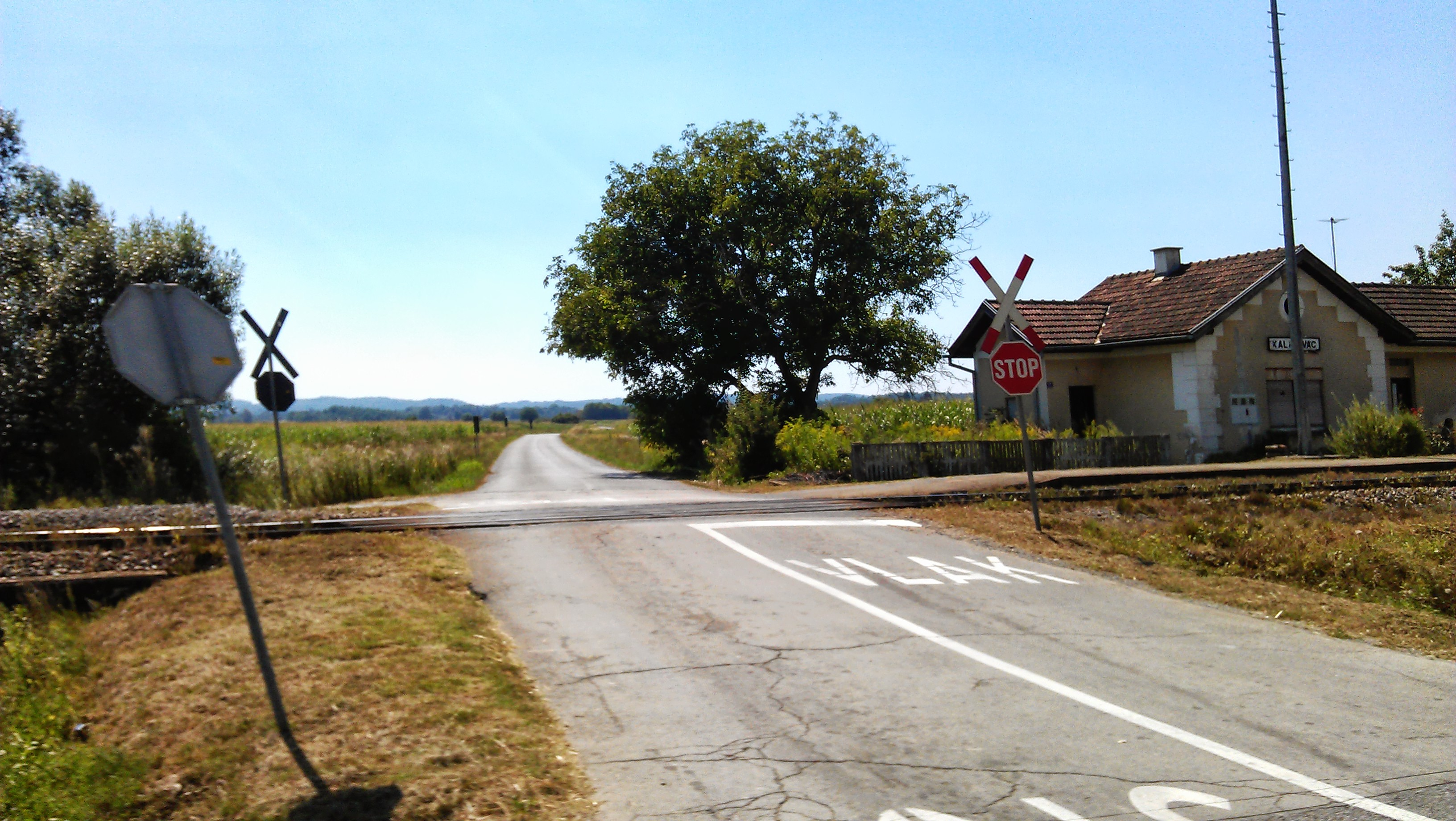 kalinovac